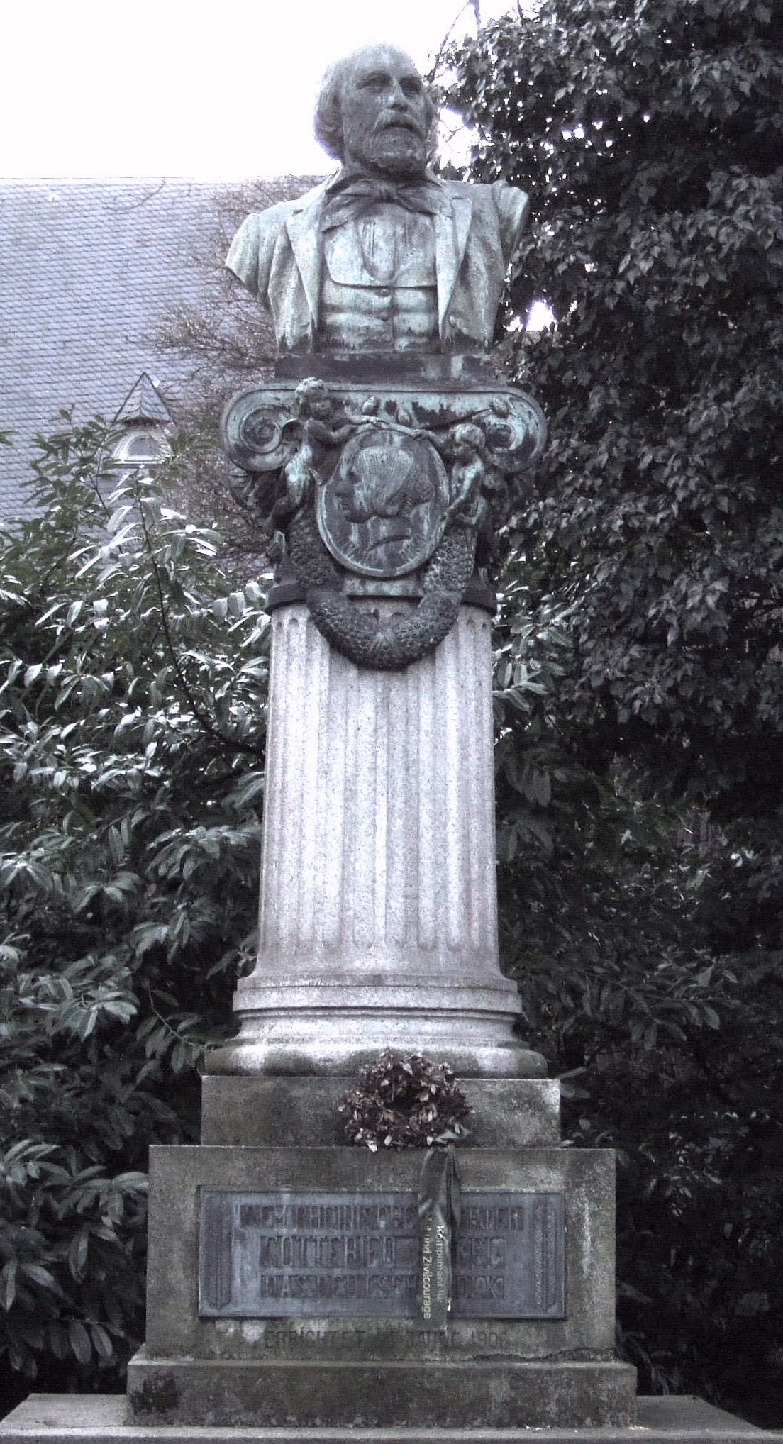 Gottfried Kinkel-Denkmal in Bonn-Oberkassel Das Denkmal wurde Kinkel in Anerkennung seiner dichterischen Leistungen auf Initiative des Regierungsrates Josef Joesten errichtet. Aus einem Wettbewerb ging der Düsseldorfer Bildhauer Gustav Rutz hervor, der 1905/06 die ionische Säule mit der Portraitbüste und dem Sockel mit den drei Bronzereliefs schuf. Auf einem Sockel erhebt sich eine kurze, kannelierte Säule ionischer Stilrichtung.